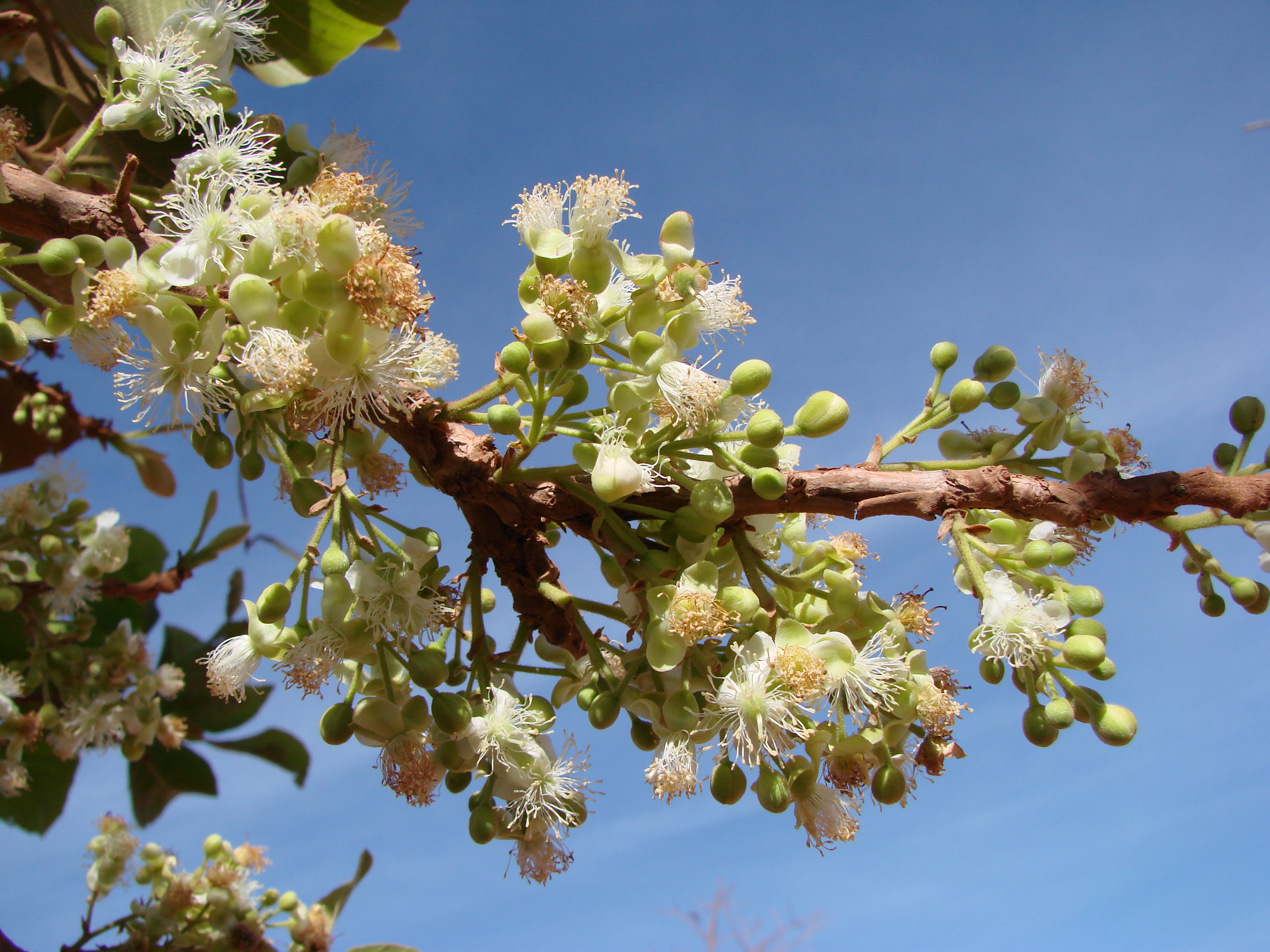 Curatella americana - DILLENIACEAE Parque Nacional do Grande Sertão Veredas - Chapada Gaúcha - Minas Gerais - Brasil.